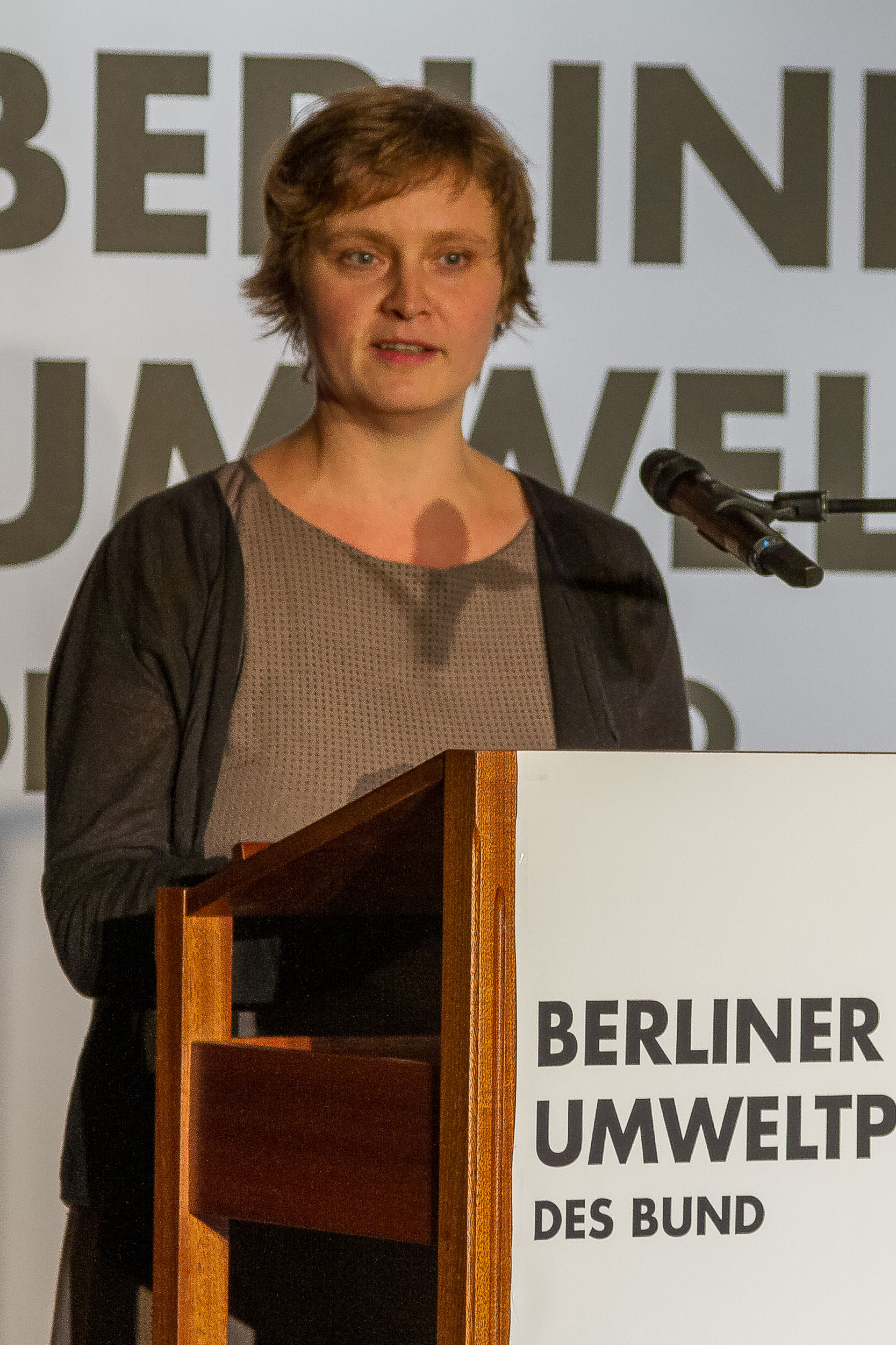 Heide Schinowsky als Laudatorin beim Berliner Umweltpreis